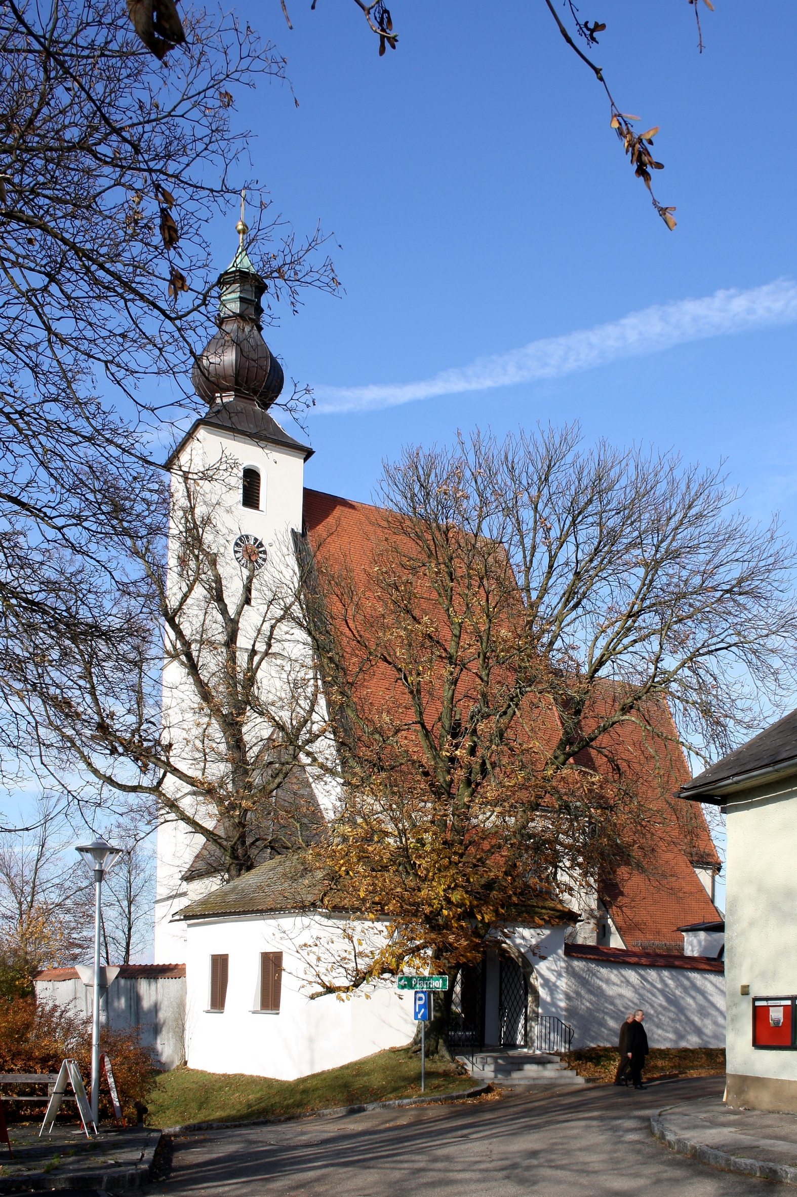 Die Pfarrkirche von Rüstorf.